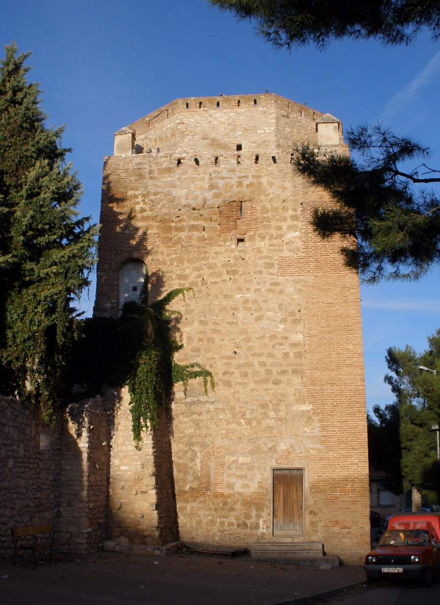 Torreón de las Monjas, en Cariñena (Zaragoza)